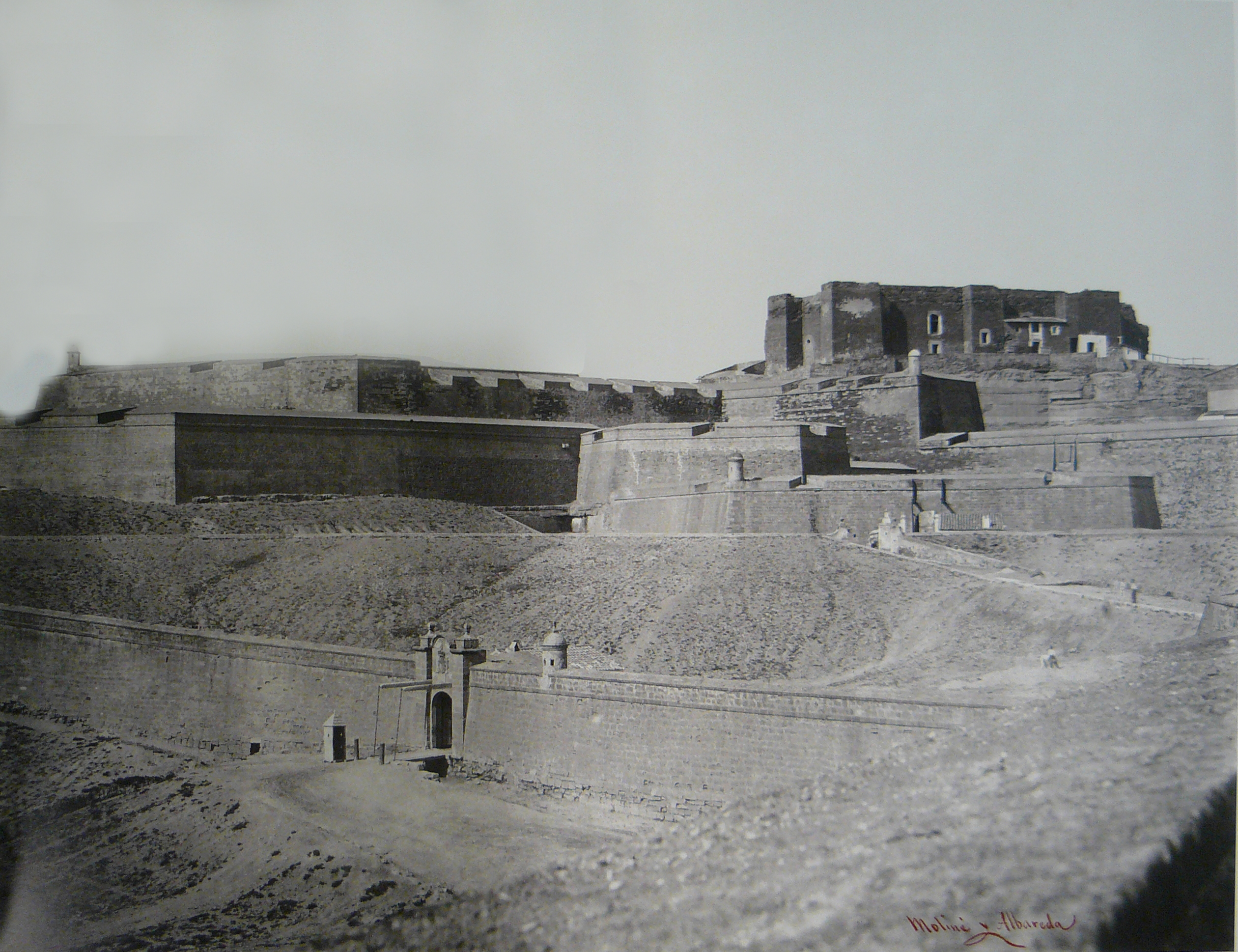 foto moliné 6